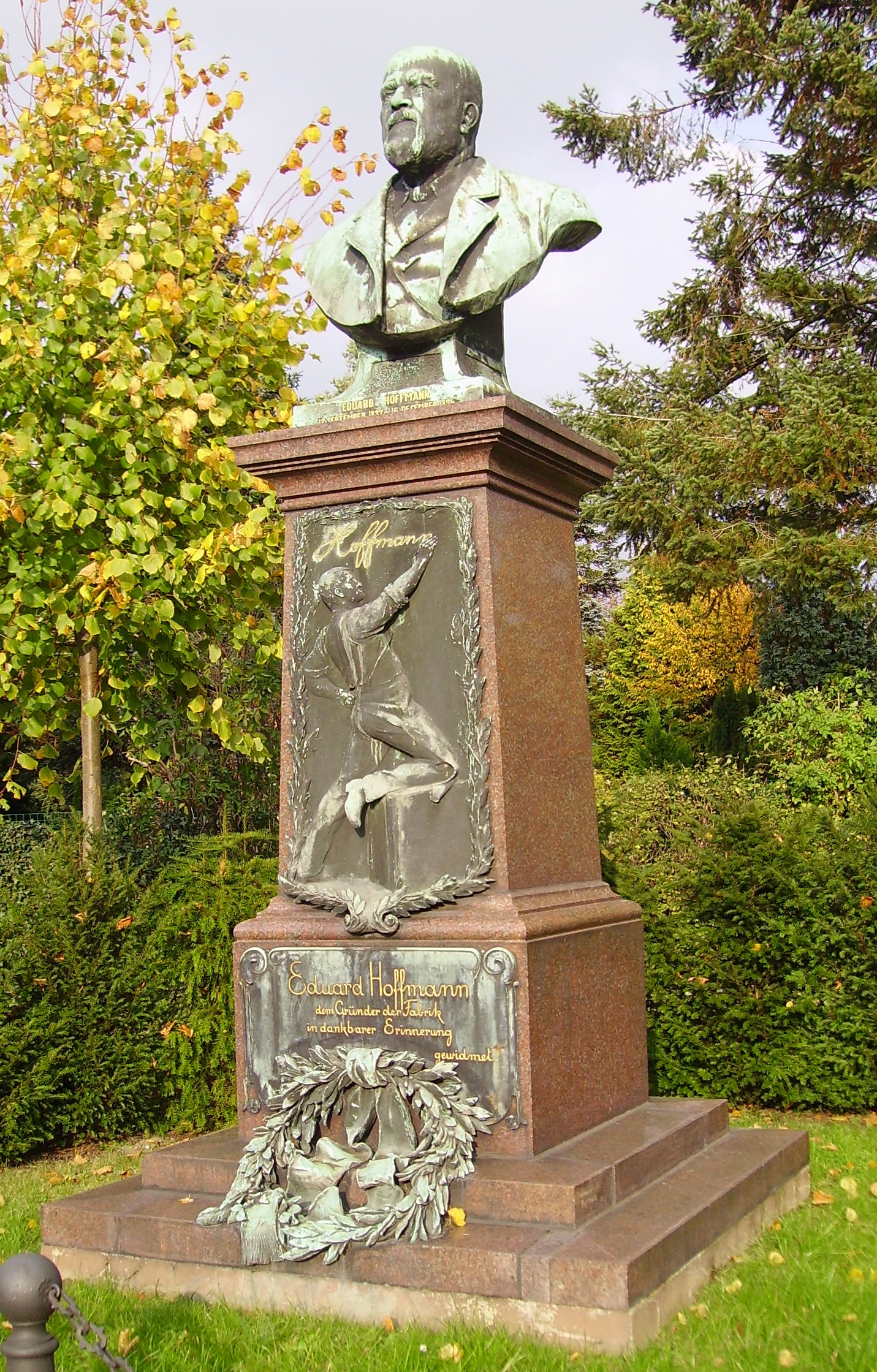 Denkmal Eduard Hoffmann, Gründer der Hoffmann`s Stärkefabriken in Bad Salzuflen